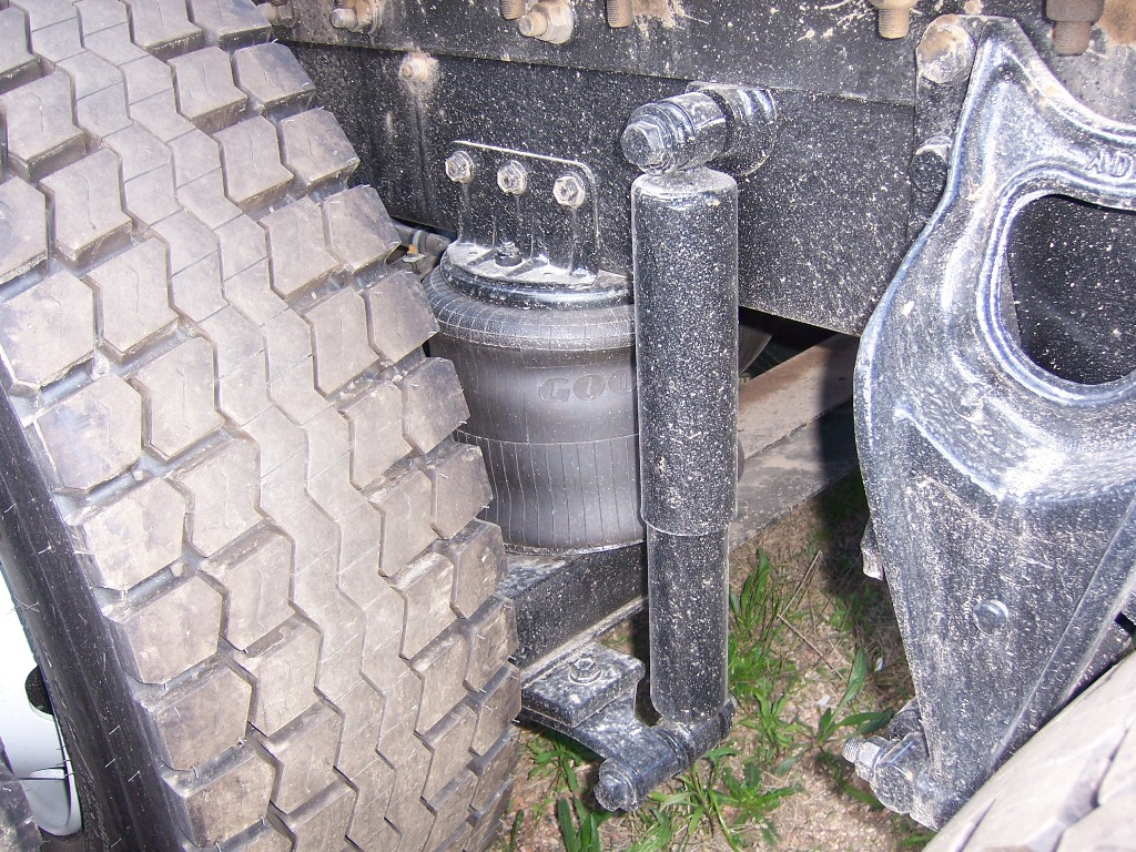 Parte del sistema de suspensión de un camión.